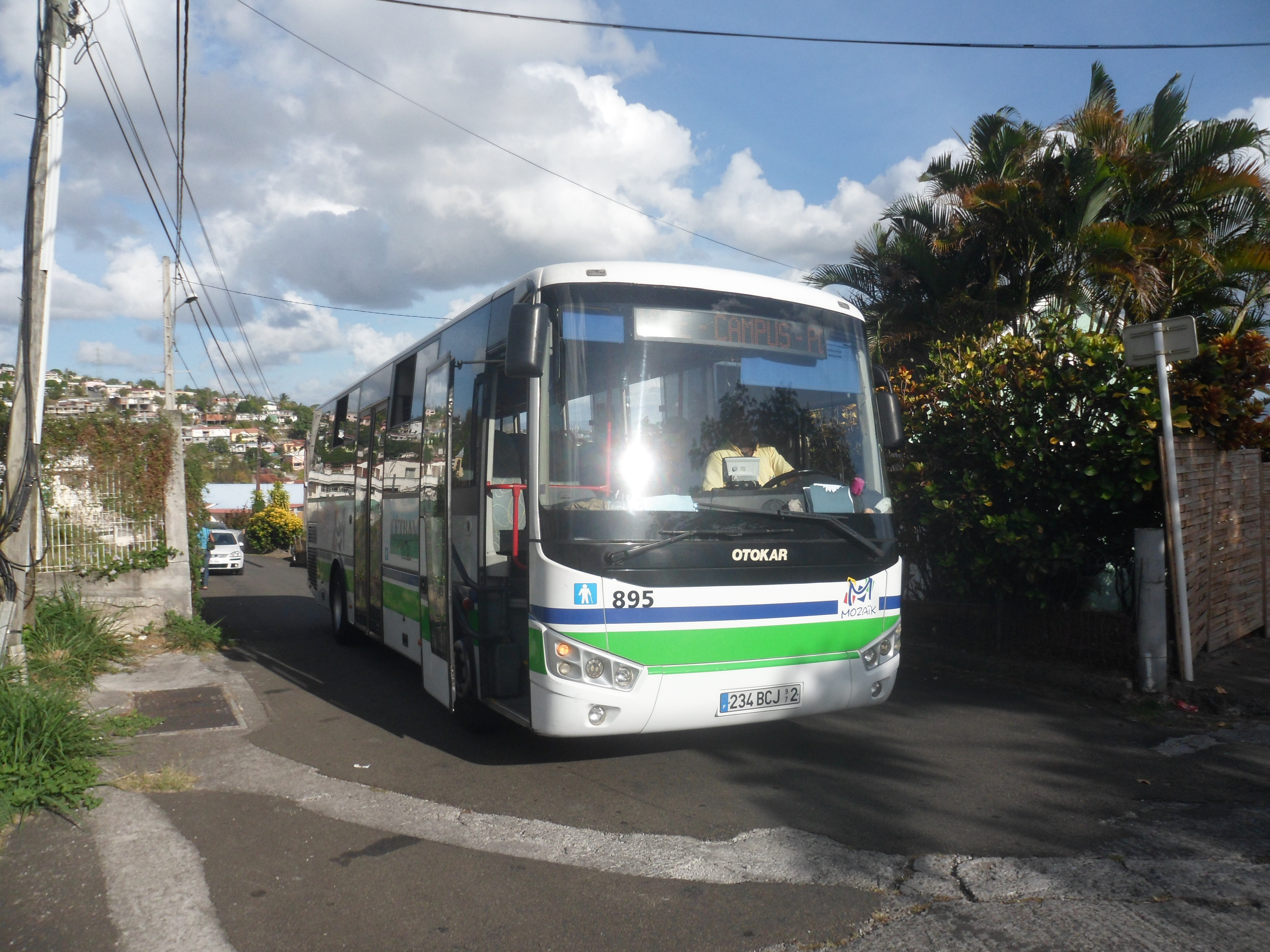 Un bus de la ligne 101 régule à son terminus La Colline, à Schoelcher, dans le secteur de Fond-Lahaye, sur le réseau Mozaïk (Martinique).